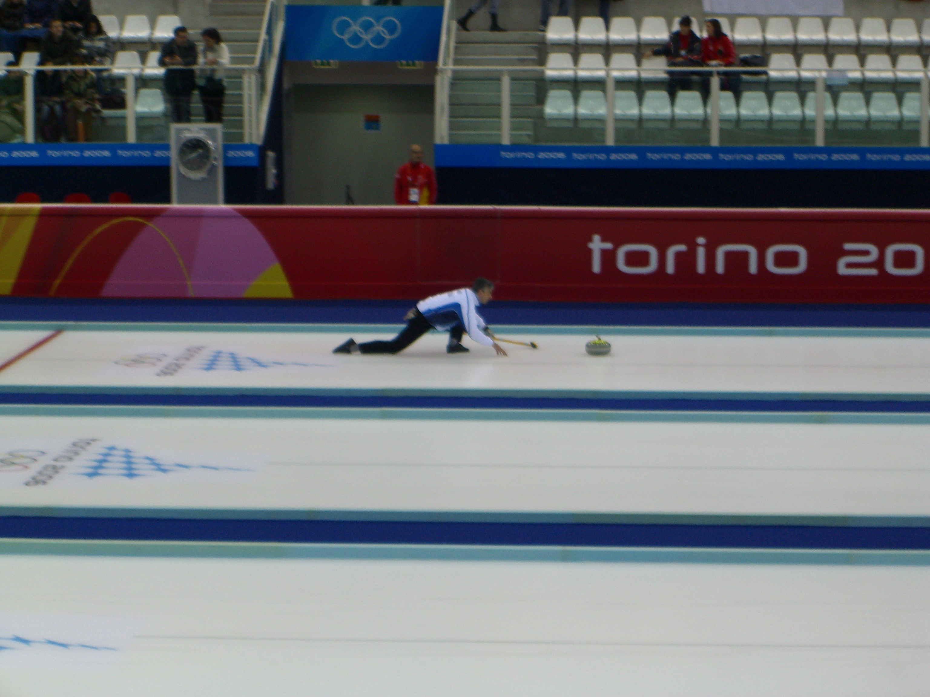 Curling nelle olimpiadi invernali di Torino del 2006. Pinerolo, Palaghiaccio.